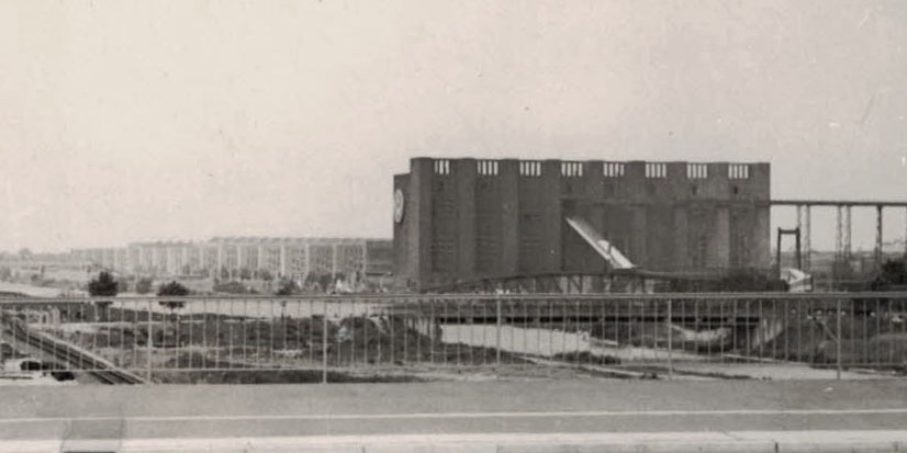 Volkswagenwerk Wolfsburg, von der Berliner Brücke aus gesehen.